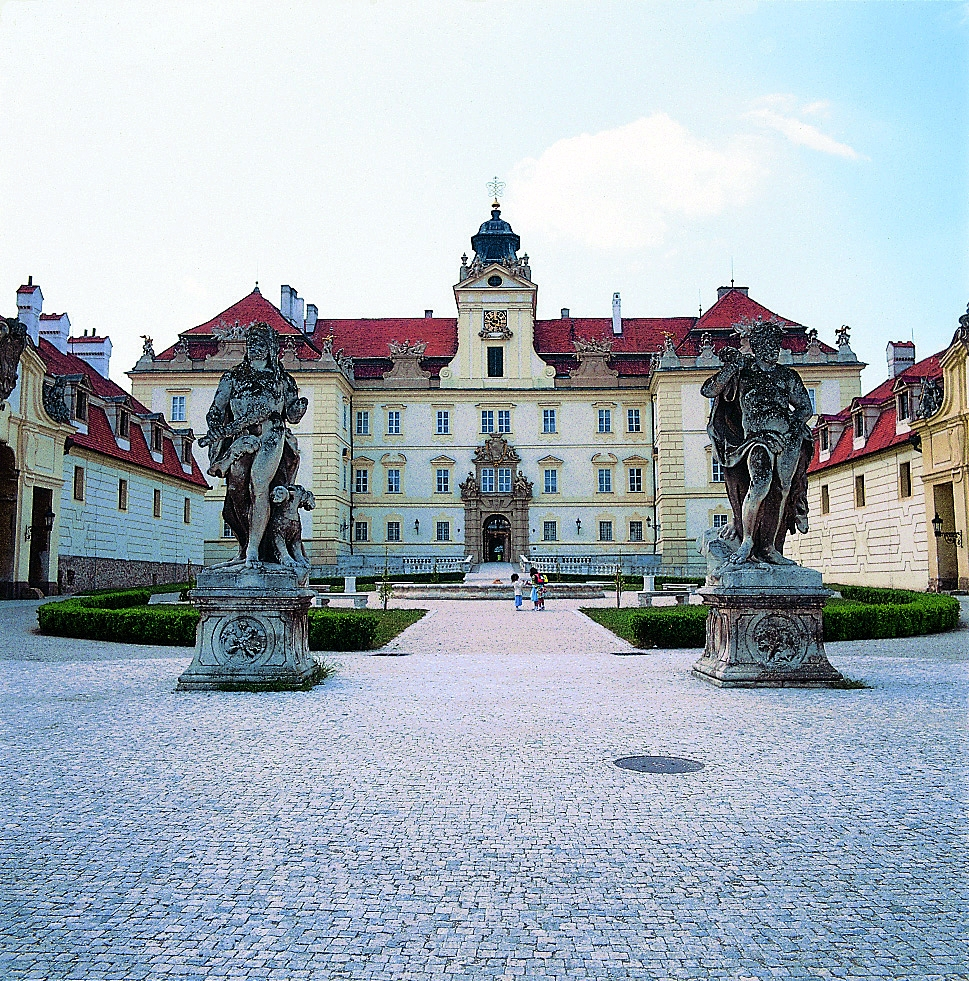 Schloss Valtice, selbst geknipst, GNU-FDL